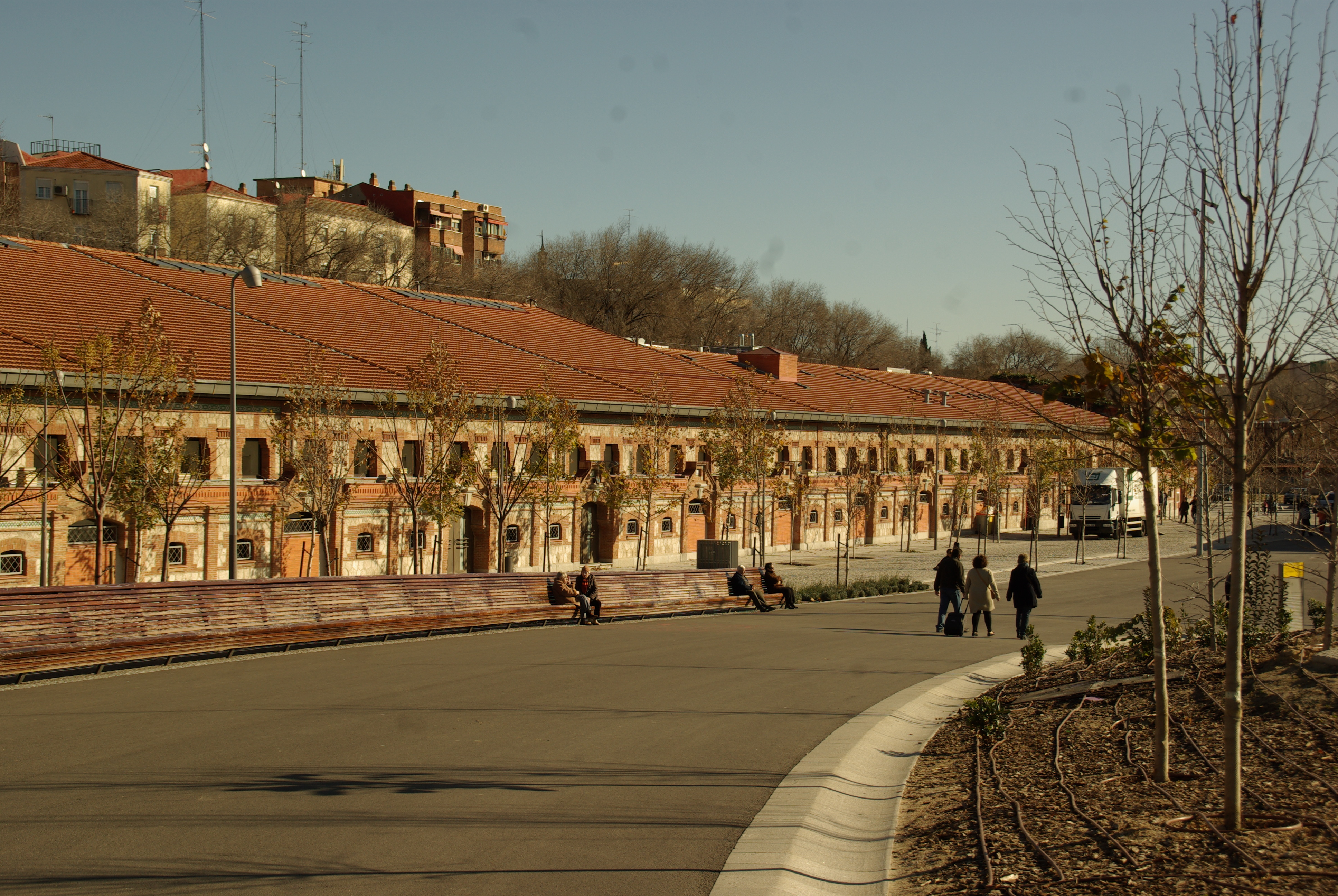 ® S.D. MADRID ARGANZUELA MATADERO- EDIFICIOS